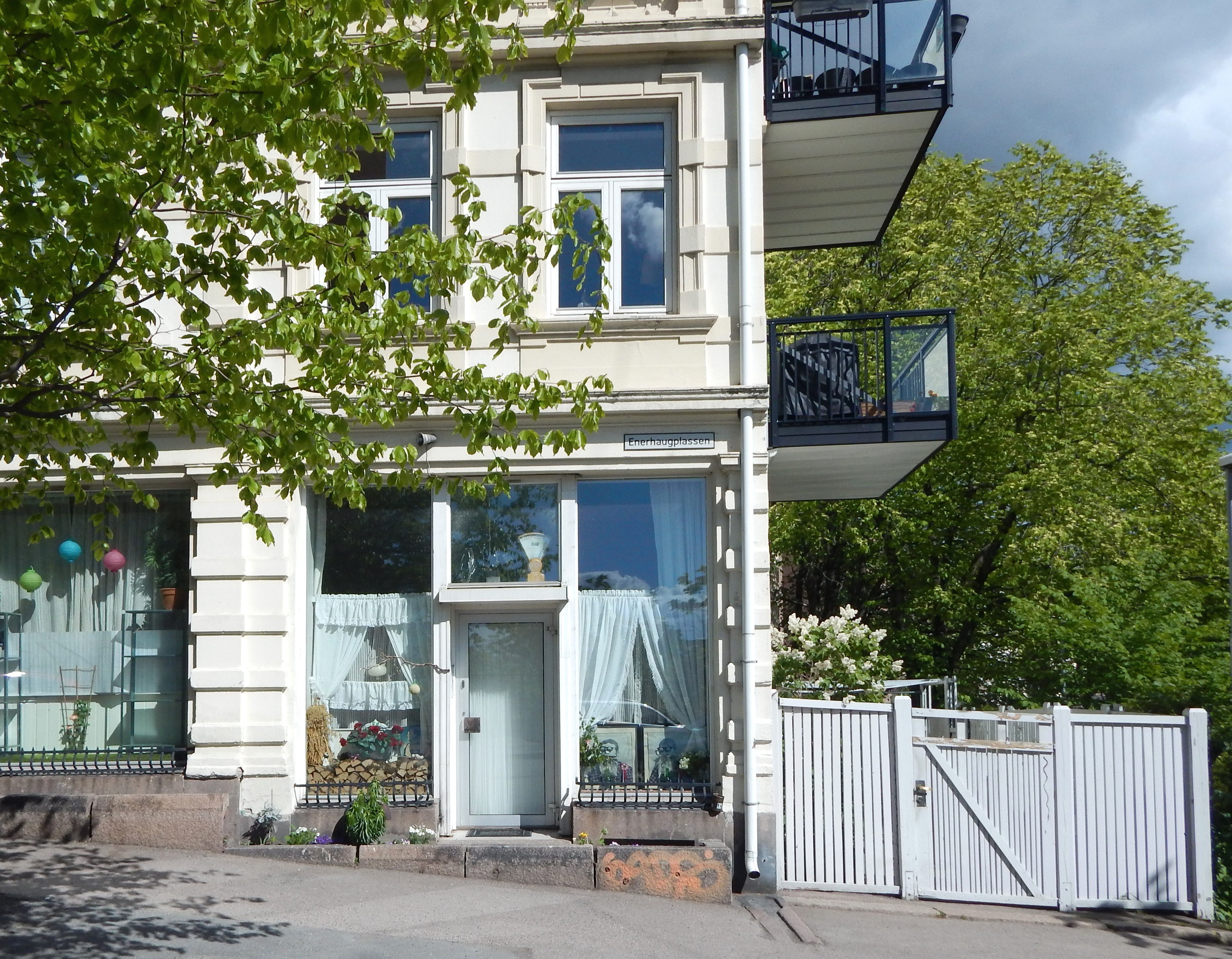 Enerhaugplassen